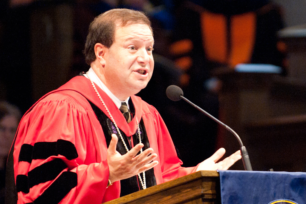 Carleton President Steven G. Poskanzer's Innaguration